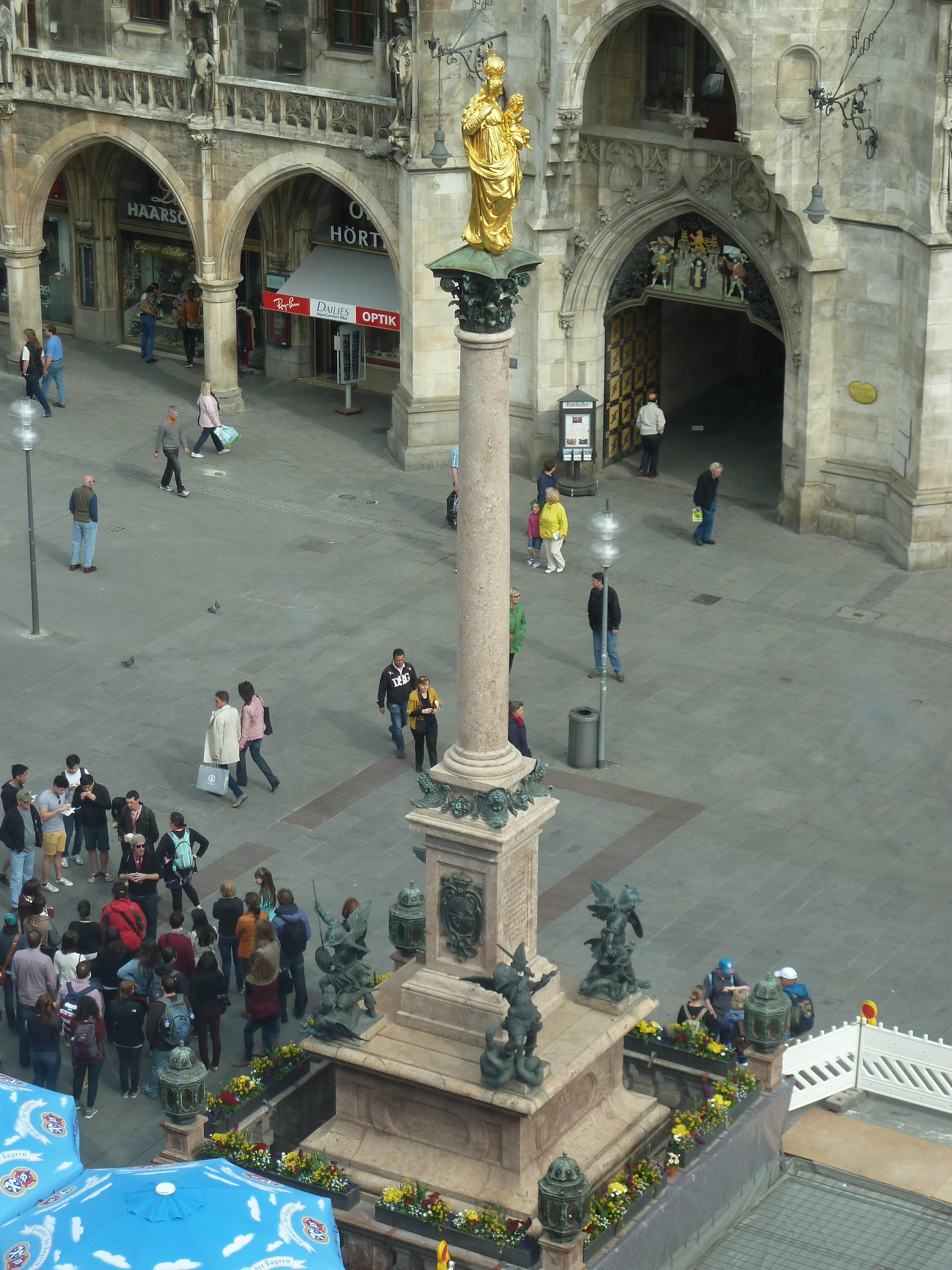 Die Münchner Mariensäule.